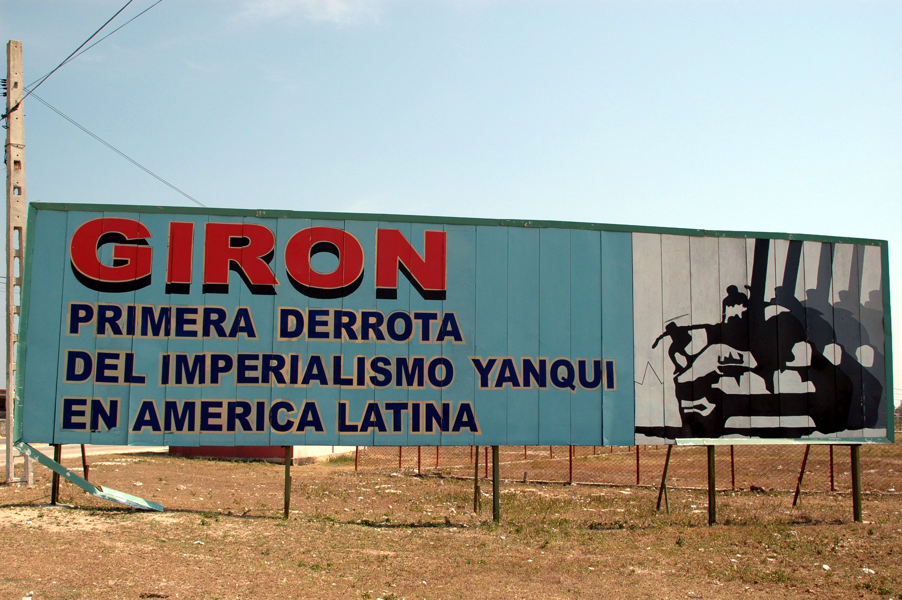 Cuba, Propaganda politica a Playa Giròn, Baia dei Porci